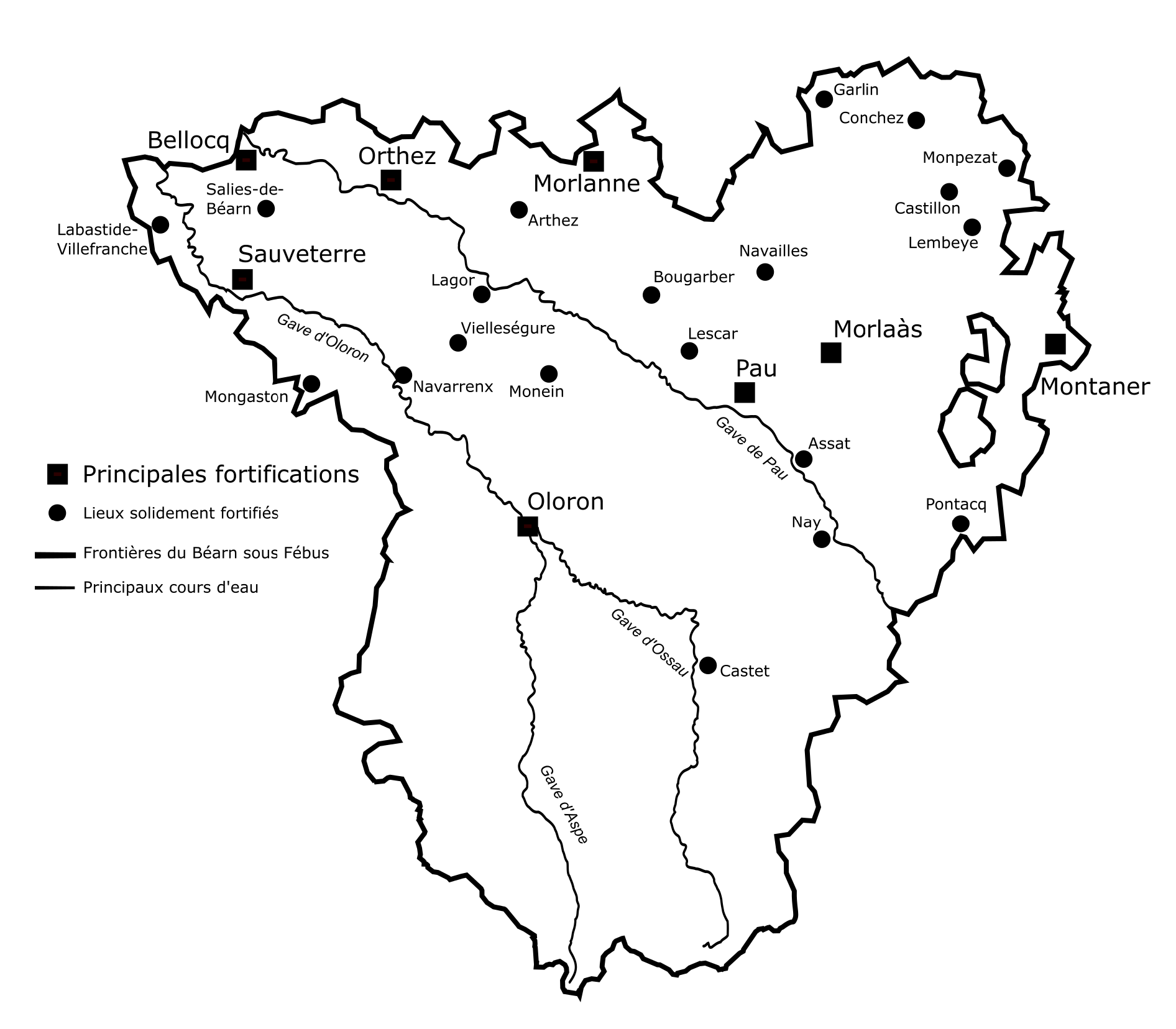 Le système défensif du Béarn sous Fébus. D'après Pierre Tucoo-Chala, Gaston Fébus : prince des Pyrénées, Editions Deucalion, 1991.